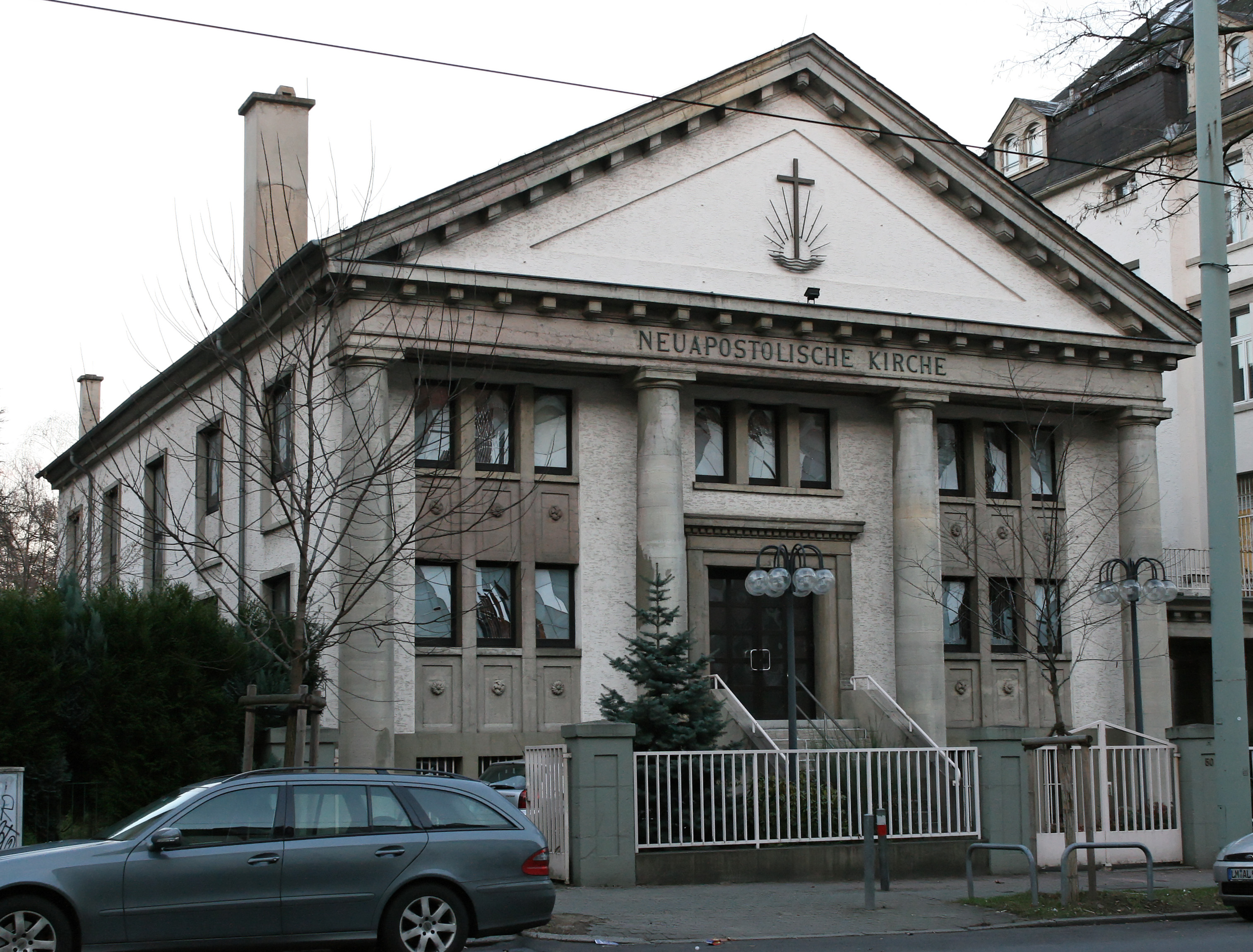 Neuapostolische Kirche in Frankfurt am Main-Bockenheim, Sophienstraße 50